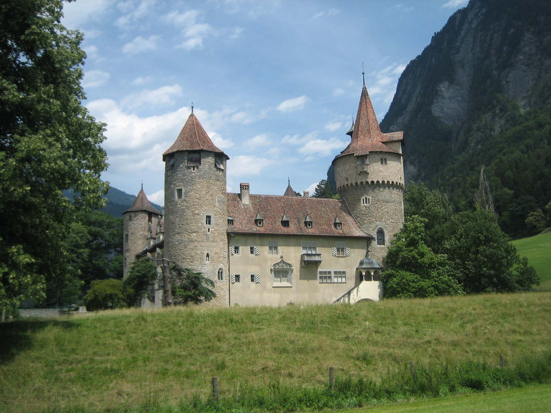 Ansicht von Süden